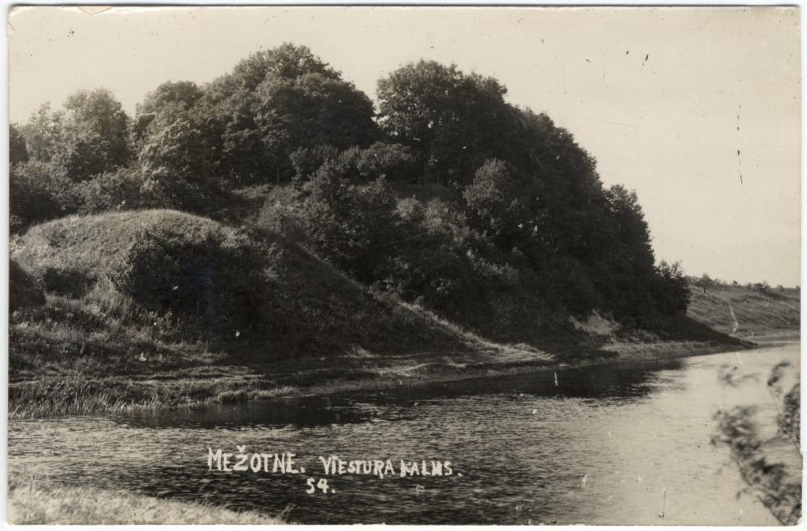 Mežotne linnamägi